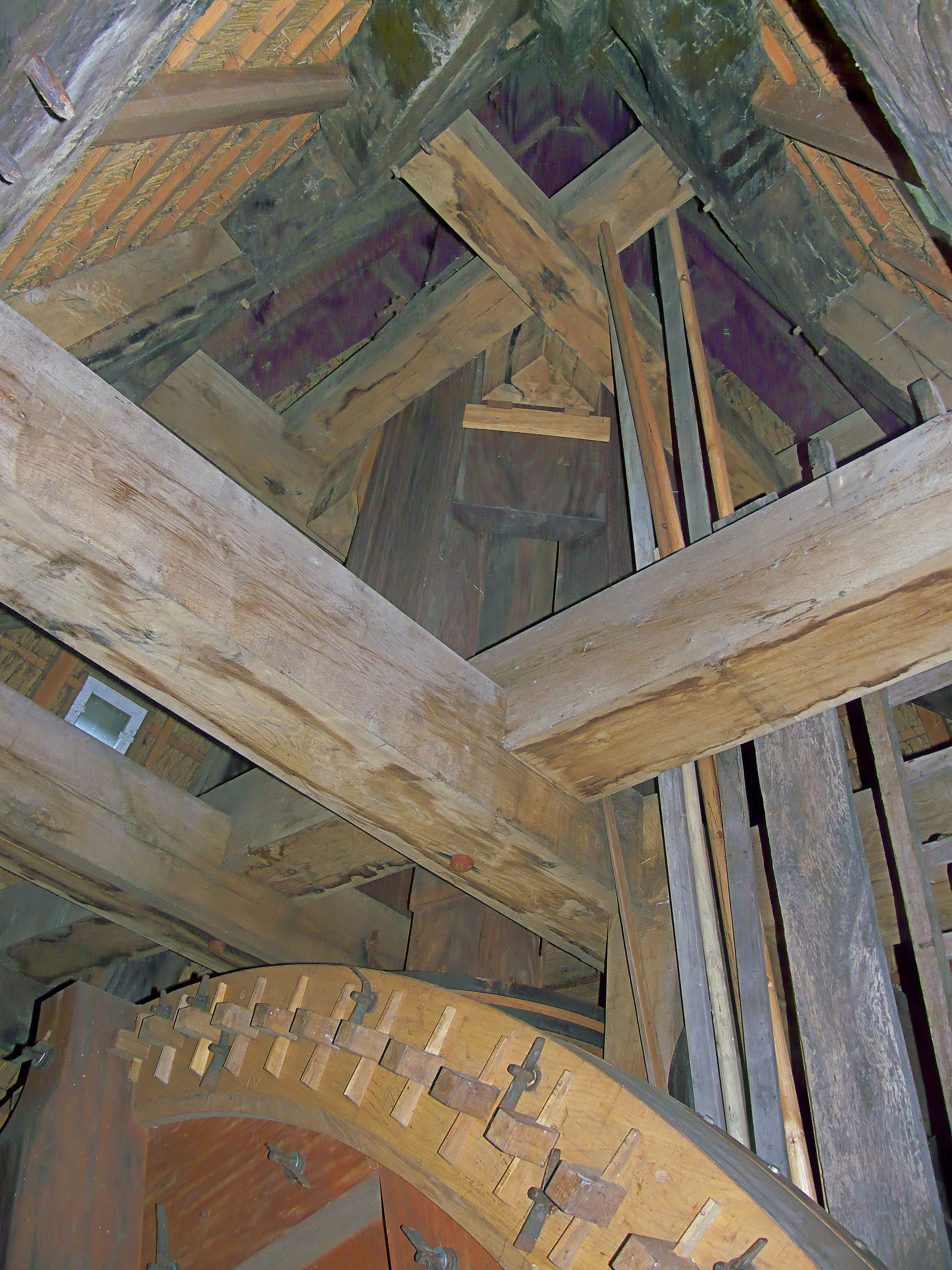 Noordeveldse molen, Dussen, Netherlands, koker in ondertoren met waterwiel)